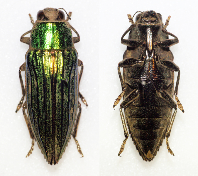 Buprestidae - In collection